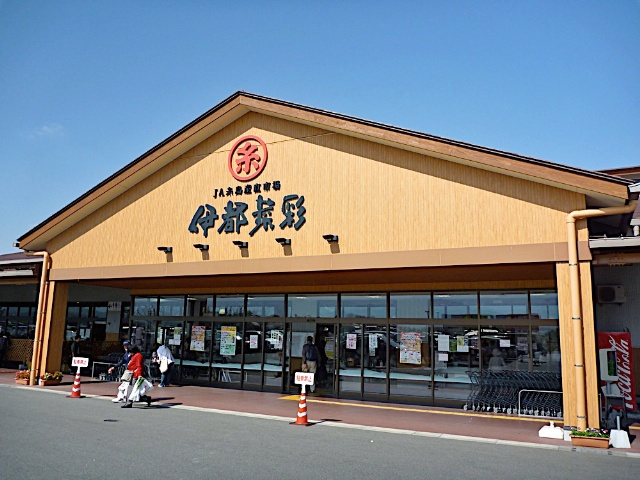 糸島の新鮮な食材が集まるＪＡ糸島産直市場「伊都菜彩」 ０８年度 開設２年で２８億円超 売り上げ全国最大級に